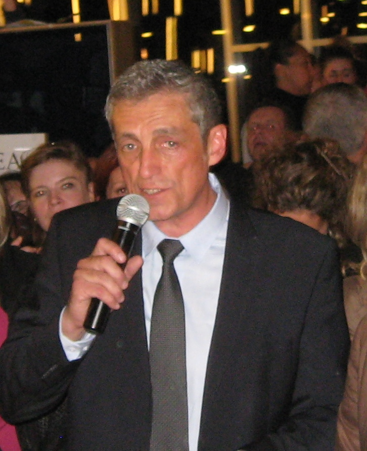 Philippe Saurel, maire de Montpellier en 2014, lors du soir de son élection dans le hall de l'hôtel de ville